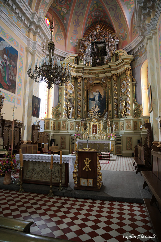 Пінск. Францысканскі касцёл. Галоўны алтар